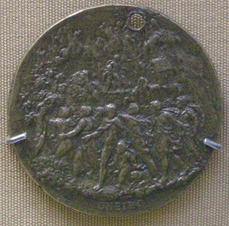 Leone leoni (attr.), medaglia di girolamo cardano, verso con sogno di cardano, 1550-51